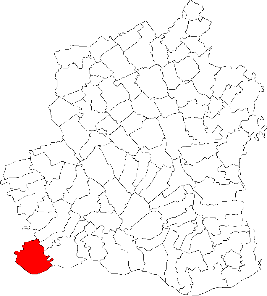 Categorie:Hărţi ale judeţului Teleorman